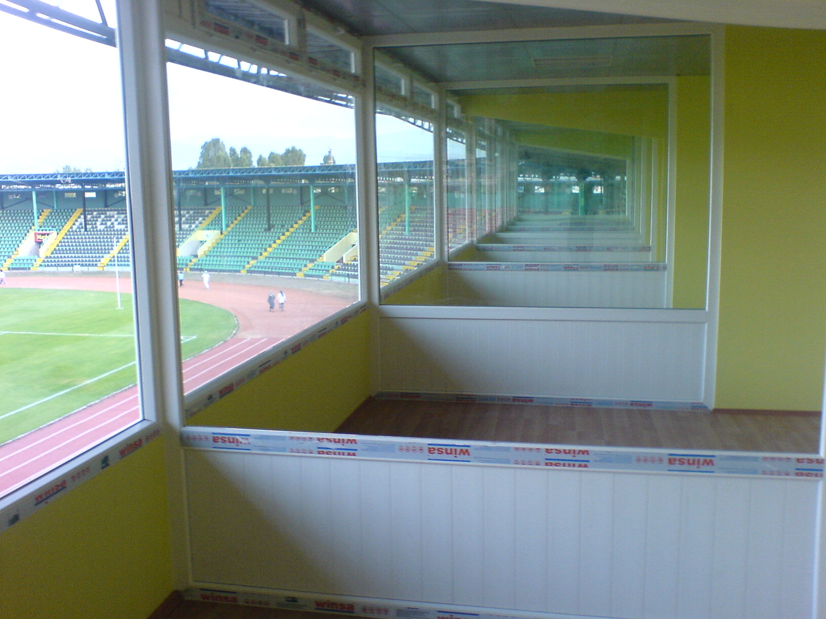 İzmit İsmetpaşa Stadyumu